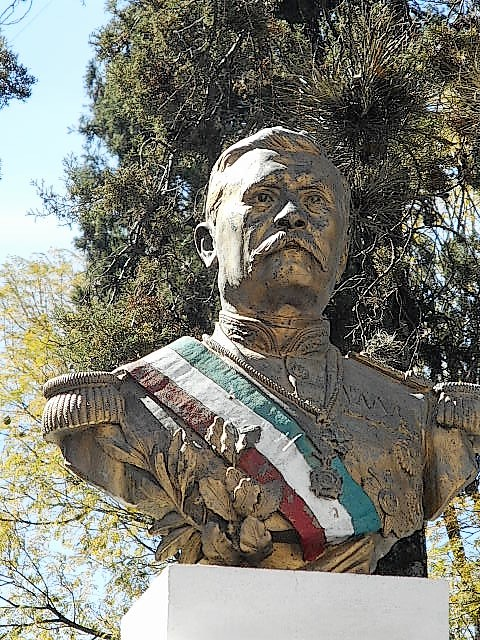 Busto de Porfirio Díaz en Tlaxiaco, Oaxaca, México, 2018, posiblemente el único que queda en México del dictador.